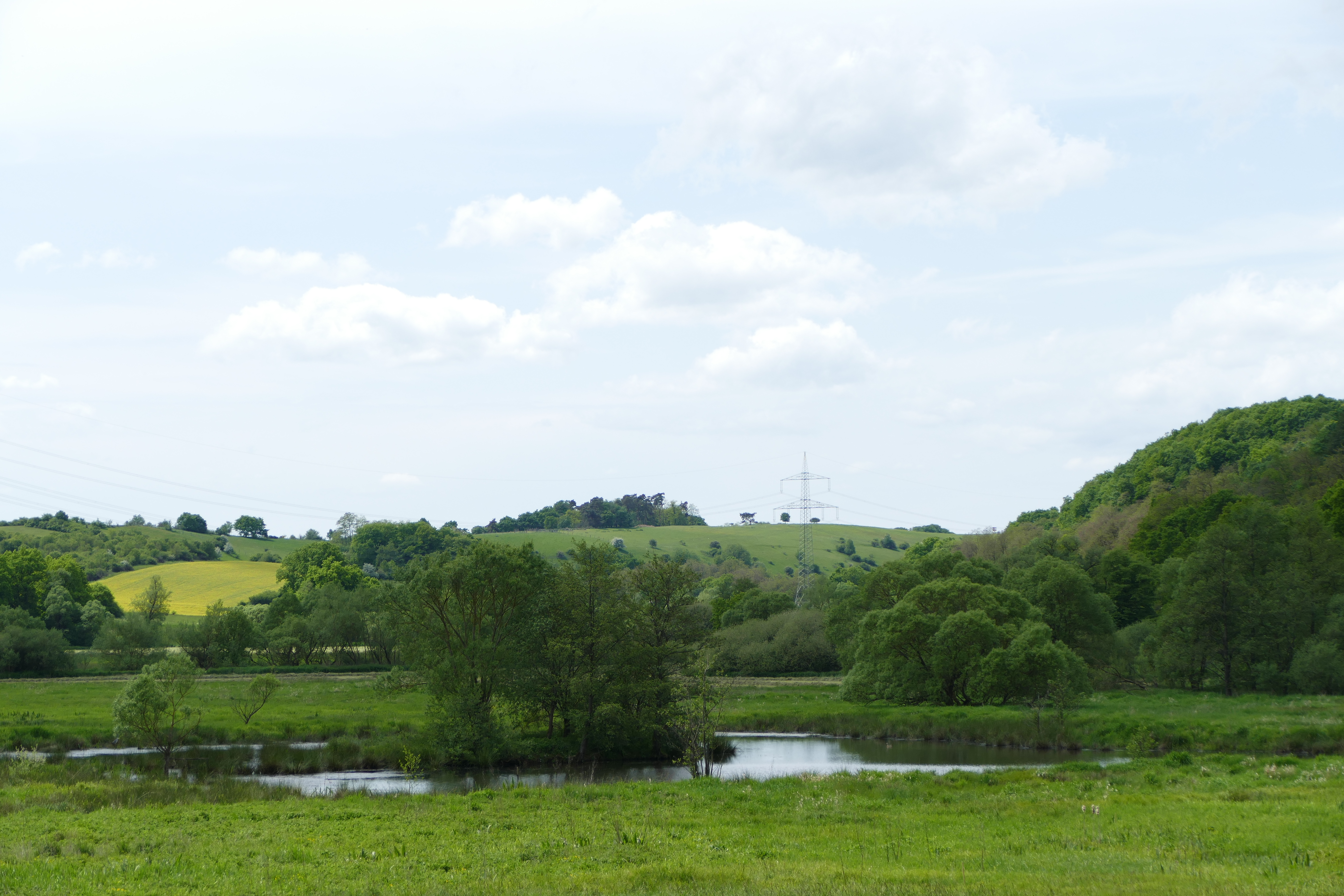 Vogel- und Naturschutzgebiet "Heimerbrühl" zwischen Nanzdietschweiler und Elschbach im Landkreis Kusel.